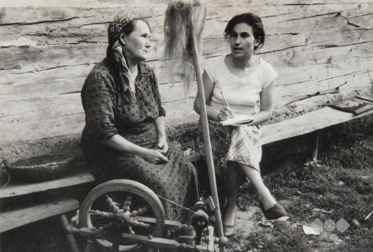 Članica ekipe Marija Makarovič zapisuje pri Peternežu, Spodnji Dolič.